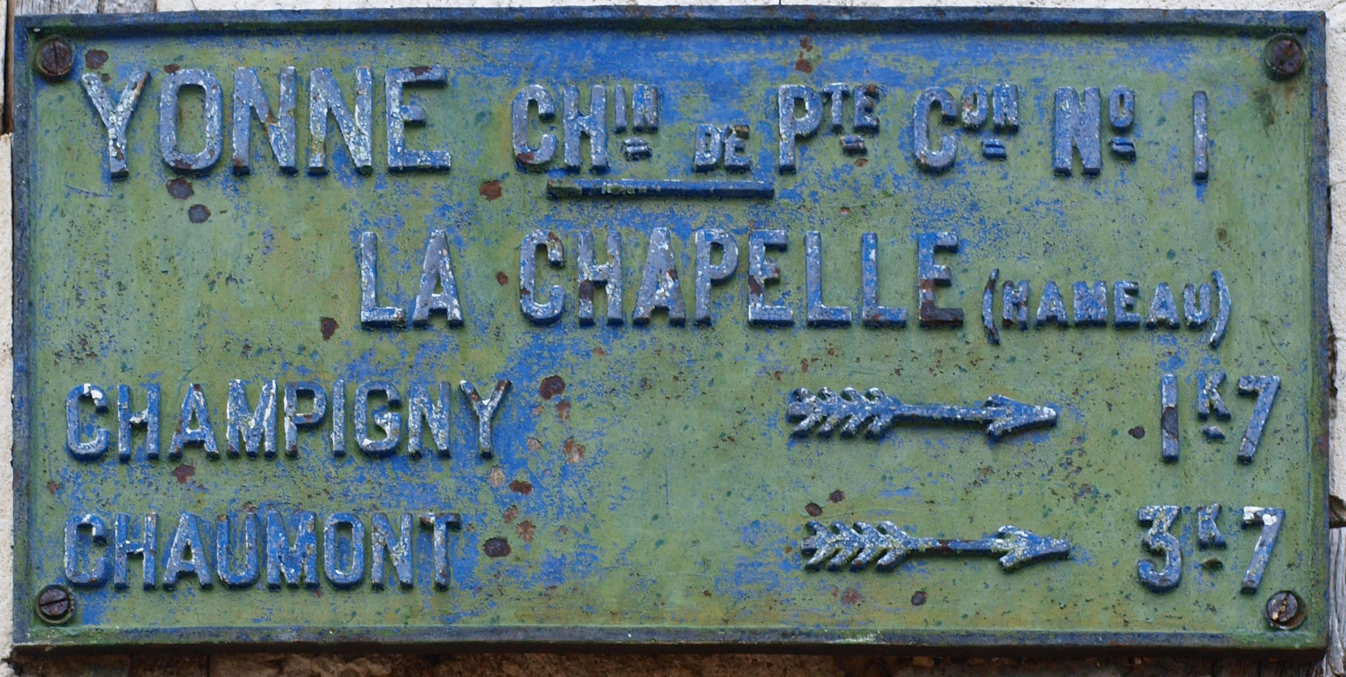 Champigny (Yonne, France) ; hameau de La Chapelle